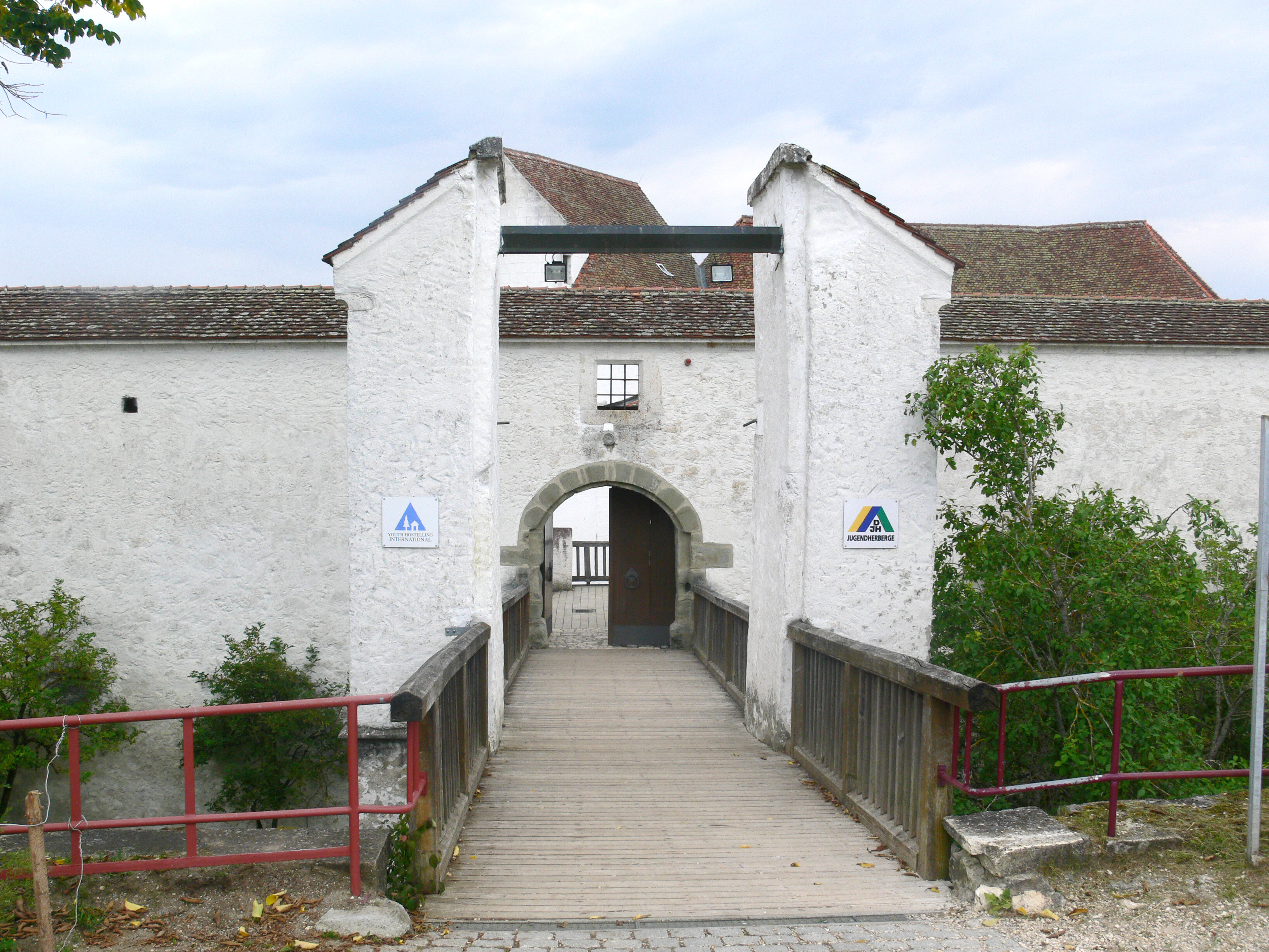 Burg Wildenstein bei Leibertingen Tor der Vorburg